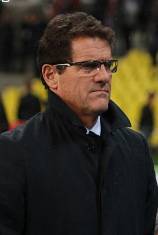 Капелло